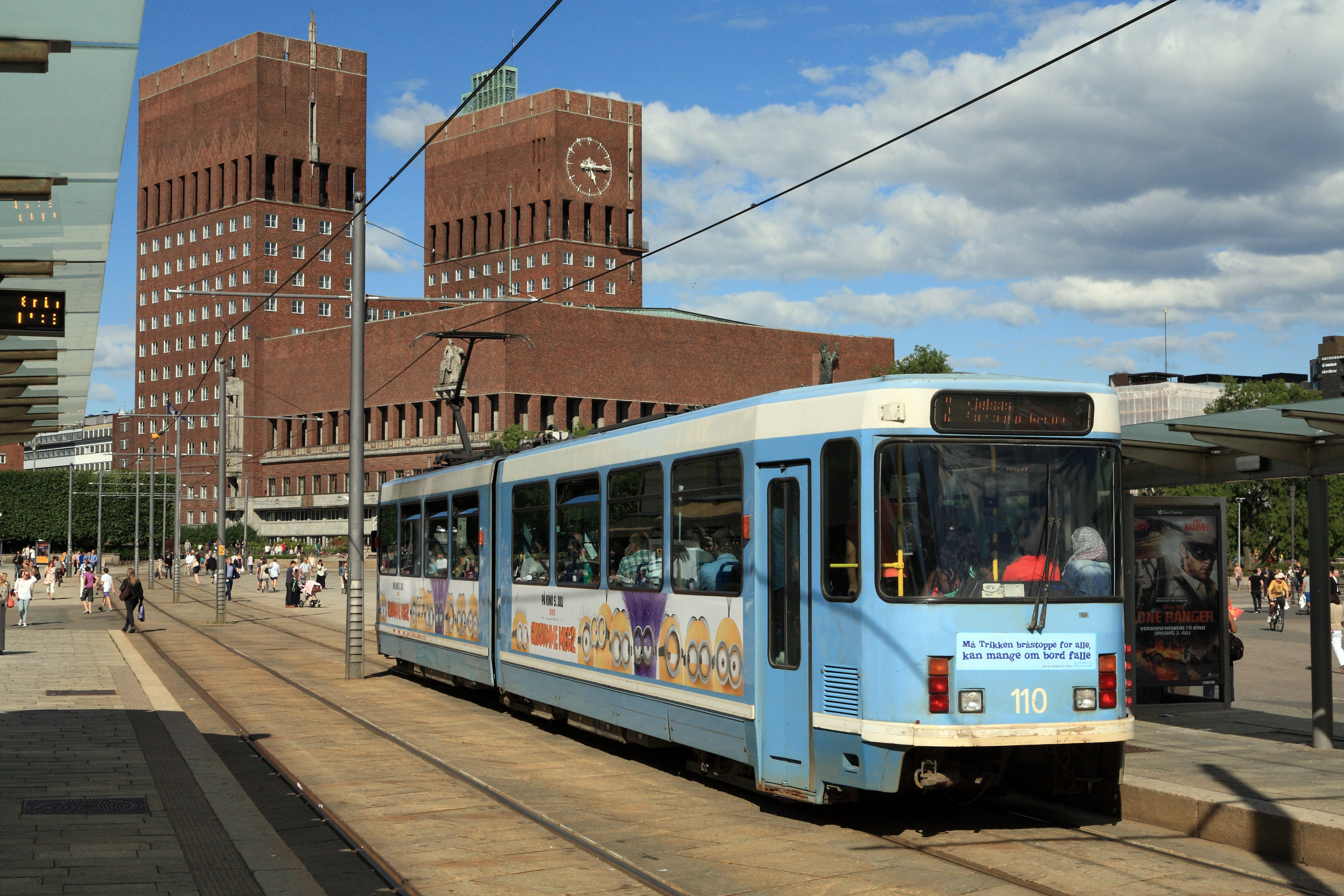 Zug der Linie 12 nach Kjelsås, B-Ende mit der für die Wagen der ersten Bauserie typischen linken Zusatztür. Im Hintergrund das Rathaus.